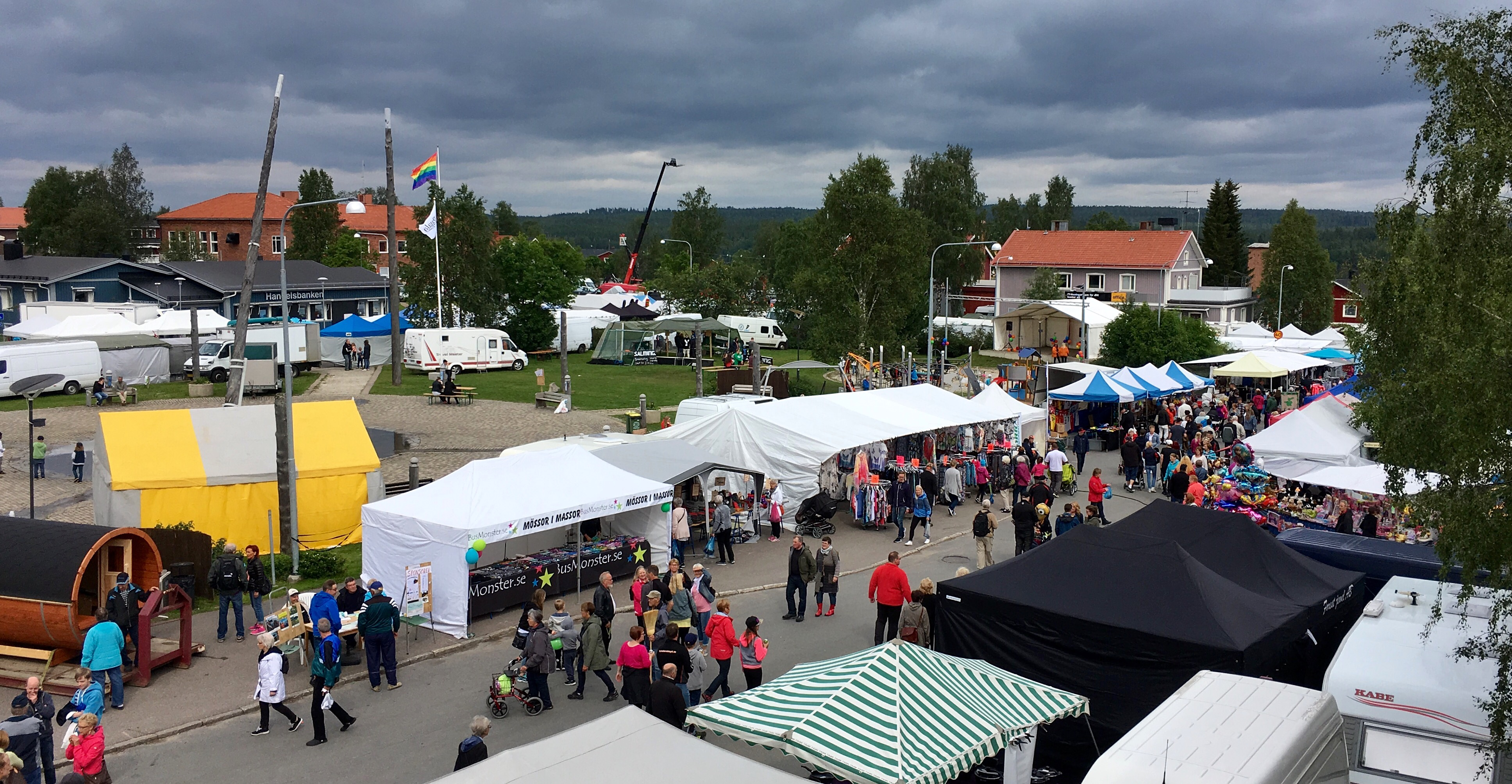 Pajala Marknad med anor från 1700-talet är en av Norrbottens största sommarmarknader. Bild från sommaren 2016.